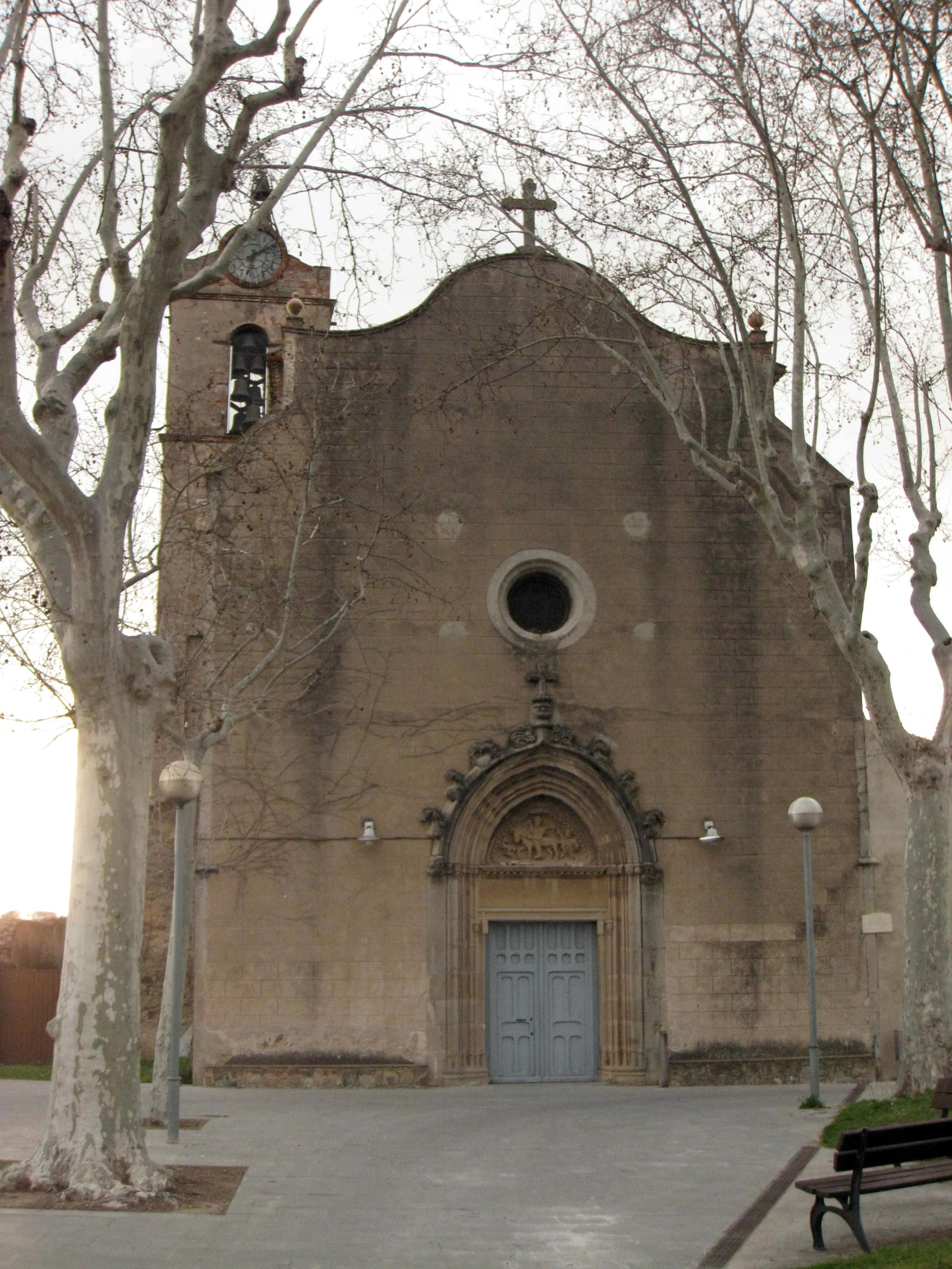 Església parroquial de Sant Julià (Granollers) Object location41° 35′ 11.25″ N, 2° 16′ 42.8″ E